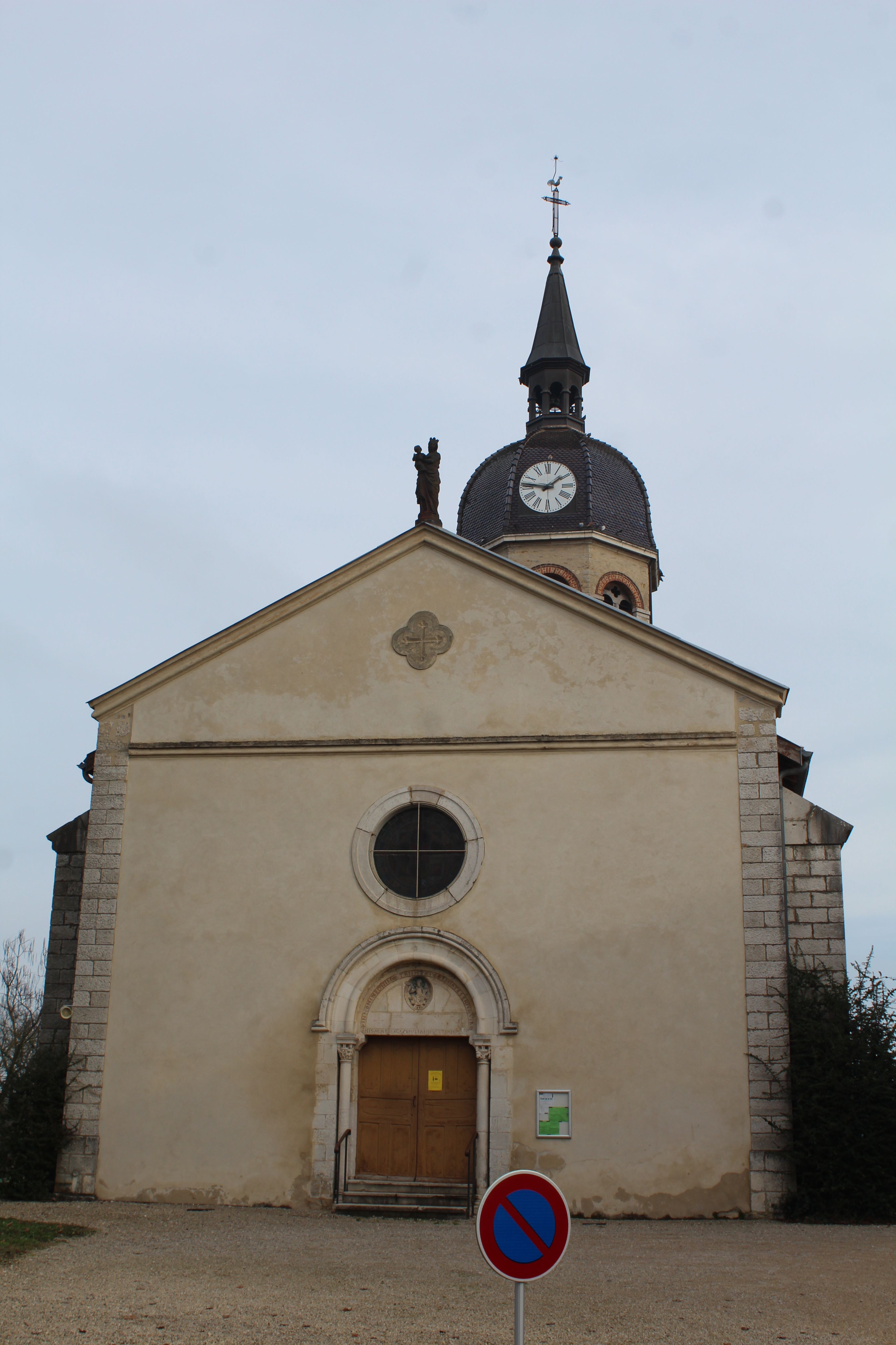 Église Saint-Julien de Condeissiat.